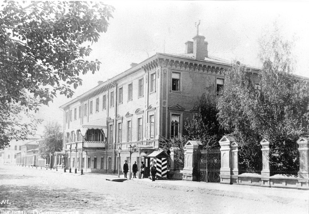 Ярославль. Губернаторский дом. Начало XX века. Ныне - Ярославский художественный музей.